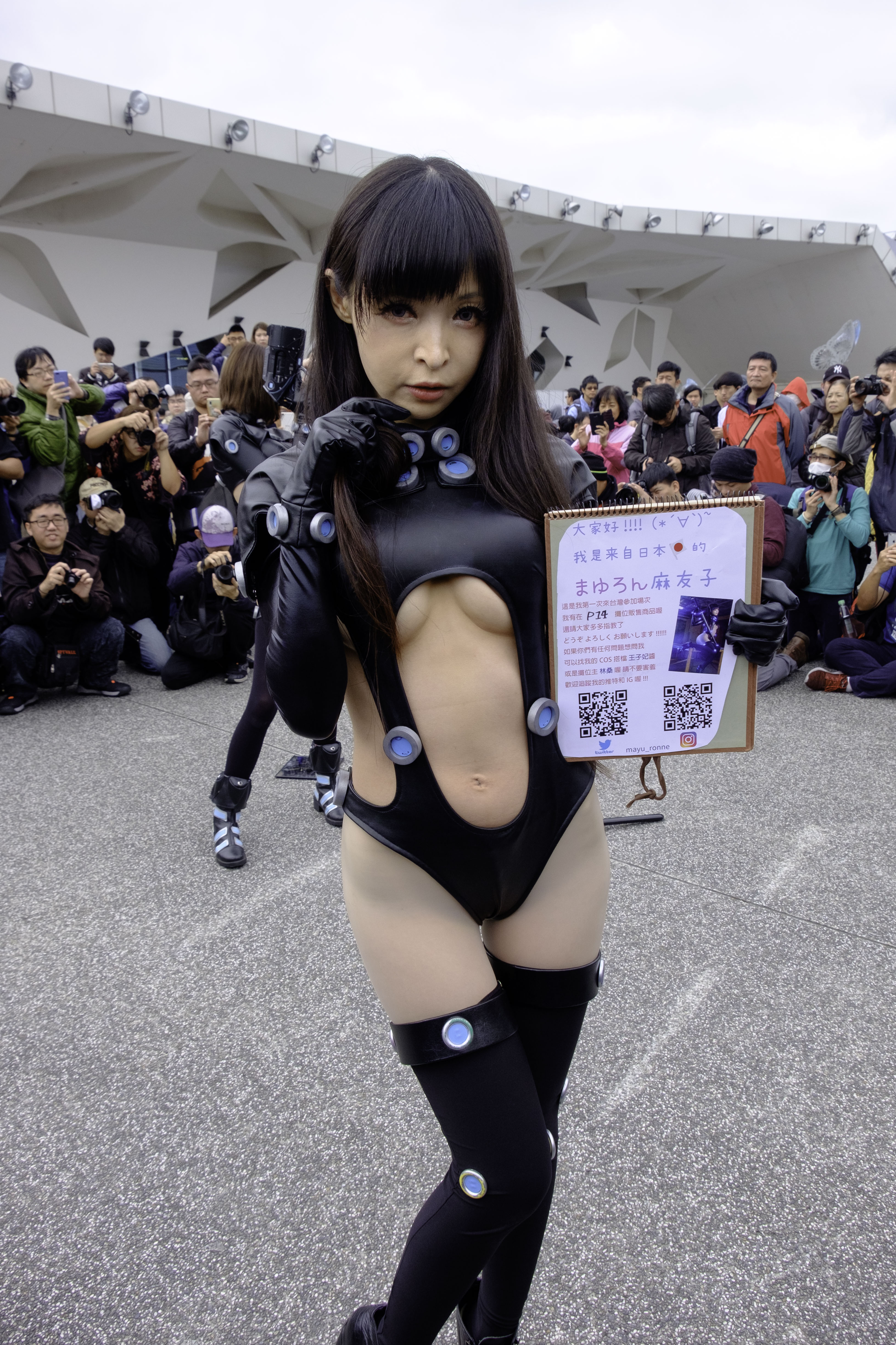 中文（台灣）: 第33屆開拓動漫祭，日本女性cosplayer麻友子cosplay《殺戮都市》下平玲花。